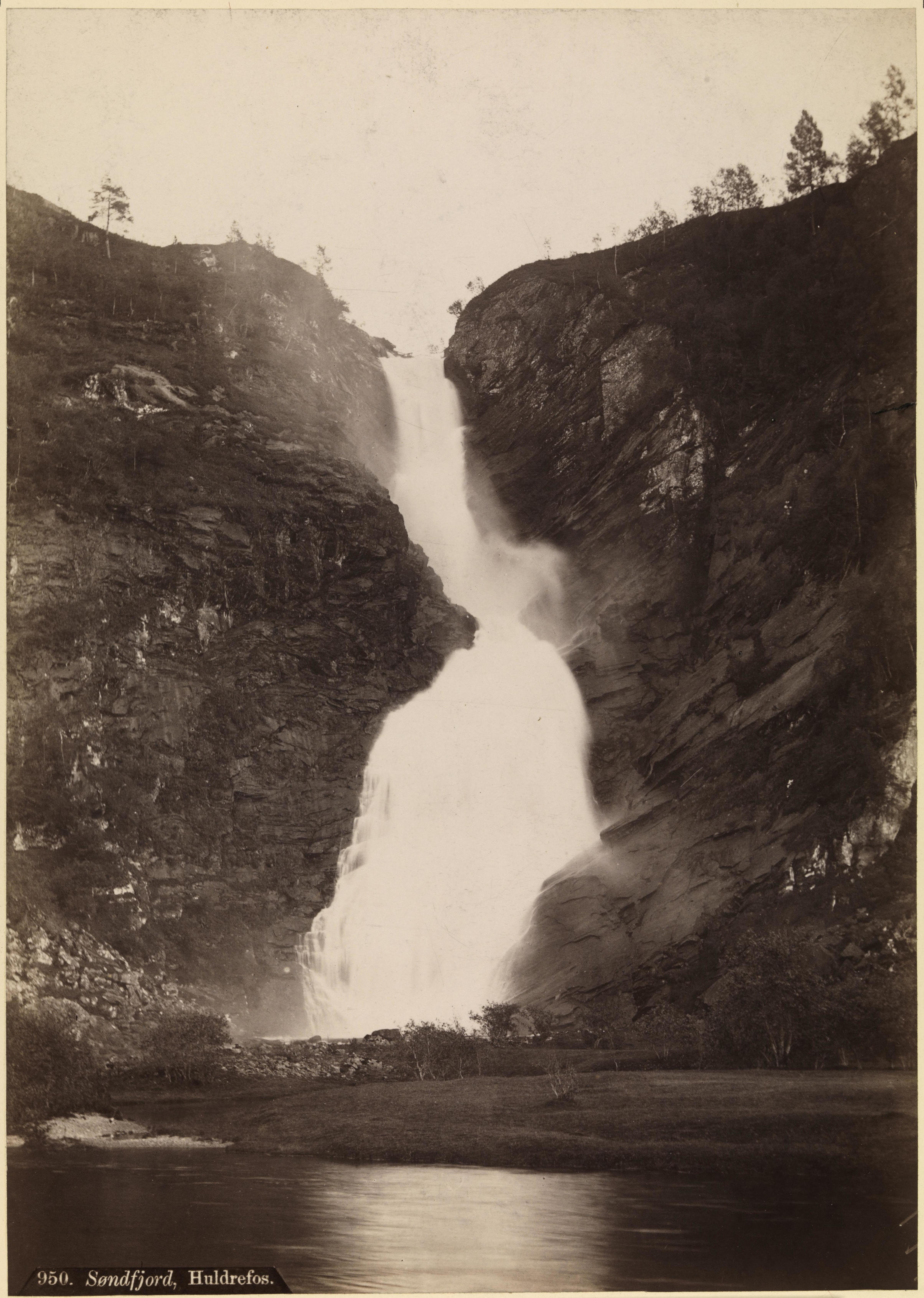 Bildet er hentet fra Nasjonalbibliotekets bildesamling Huldrefossen, Førde, Sogn og Fjordane